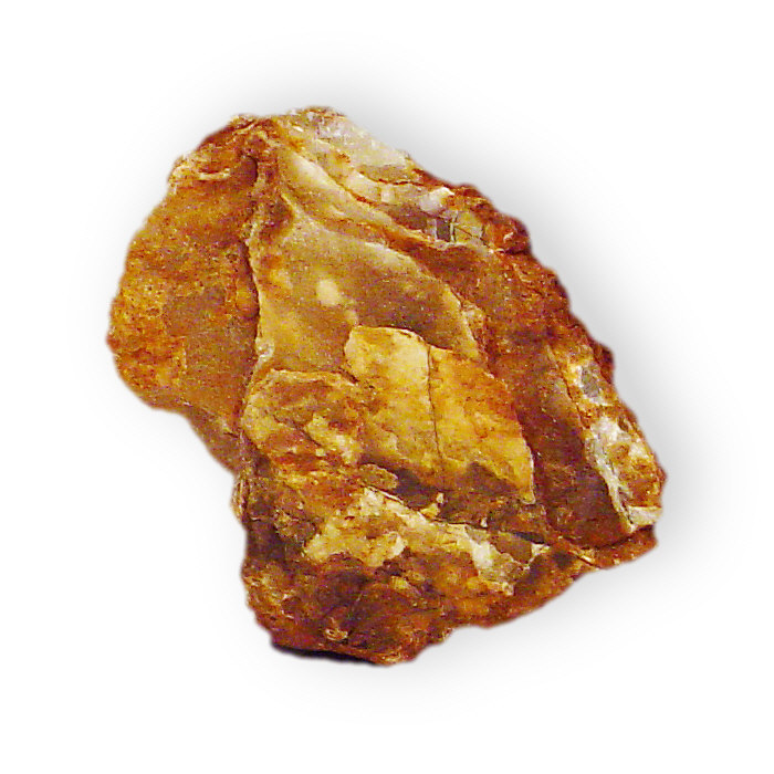 Γιββσίτης. Προέλευση: Minas Gerais, Βραζιλία These mineral images are free to use how you wish.